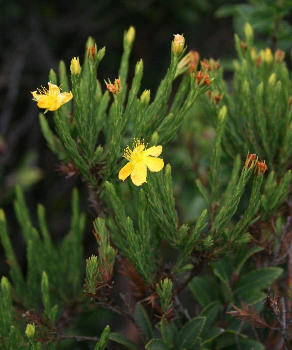 Hypericum costaricense, Johanniskrautgewächse (Hypericaceae) - Costa Rica: Prov. Alajuela, Parque Nacional Volcán Poás, 2550-2600 m